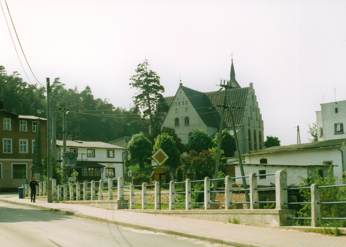 Smołdzino, church